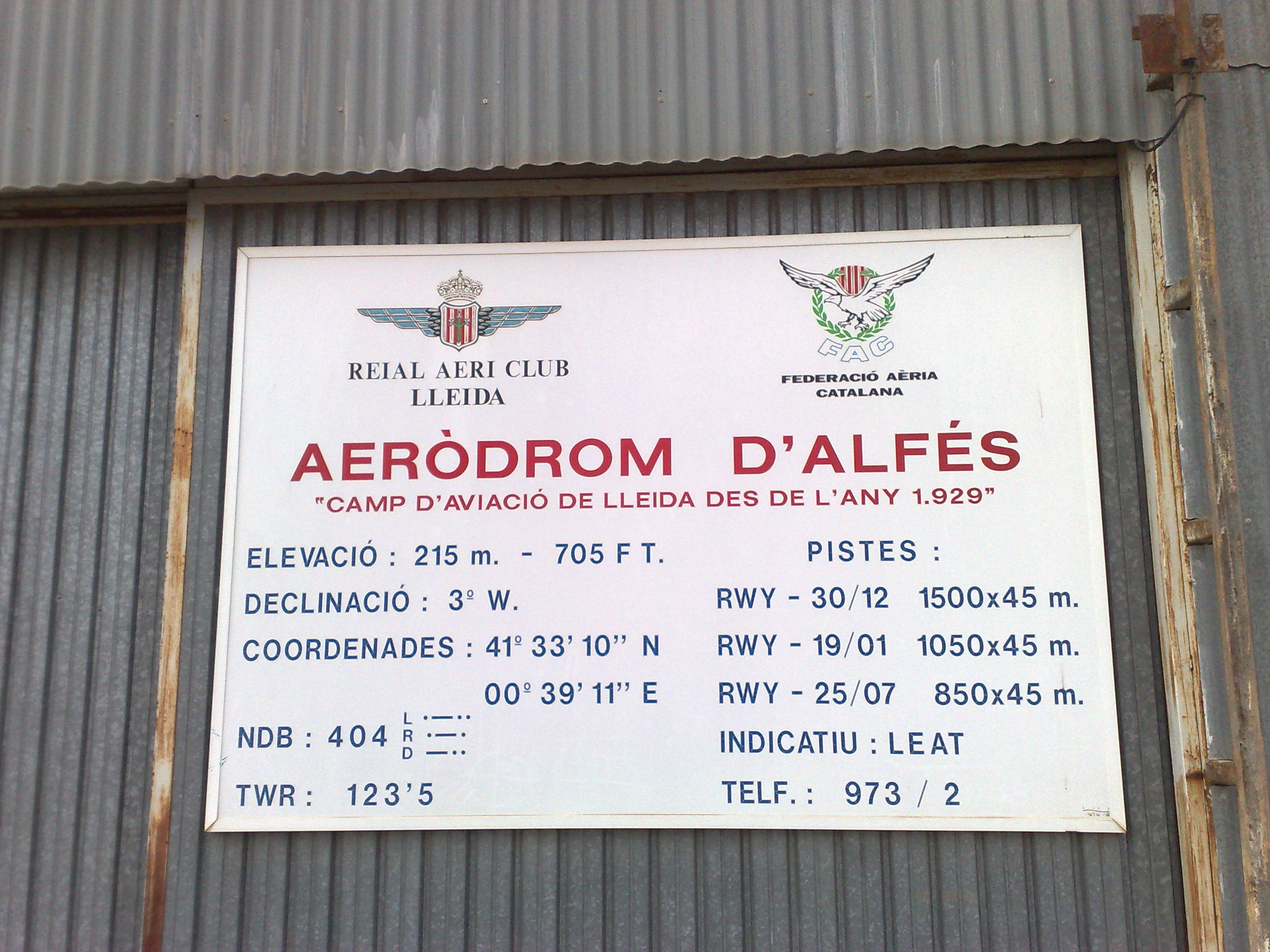 Rètol informatiu del hangar principal de l'aeròdrom d'Alfés, al Segrià.